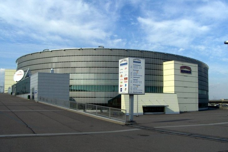 Hartwall Areena in Helsinki, Finland.